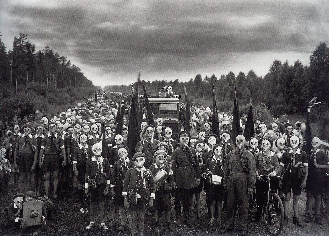 Оборона пионеров. Ленинград (1937)